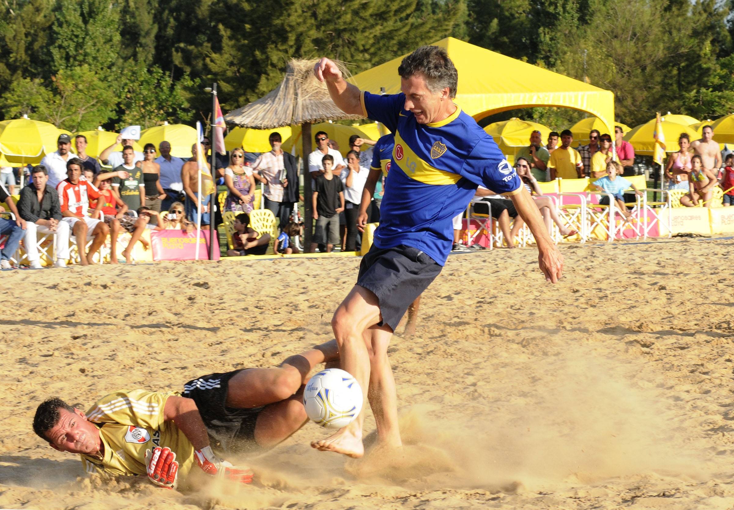 Baires. Febrero 26 de 2011. El Jefe de Gobierno porteño, mauricio macri, participa de l "Superclasico", jugado esta tarde en Buenos Aires Playa, en el bariio de Nuñez.-Foto GCBA.